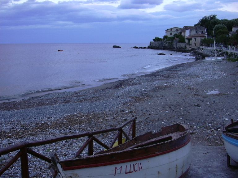 Foto notturna della spiaggia di Scario, frazione di San Giovanni a Piro